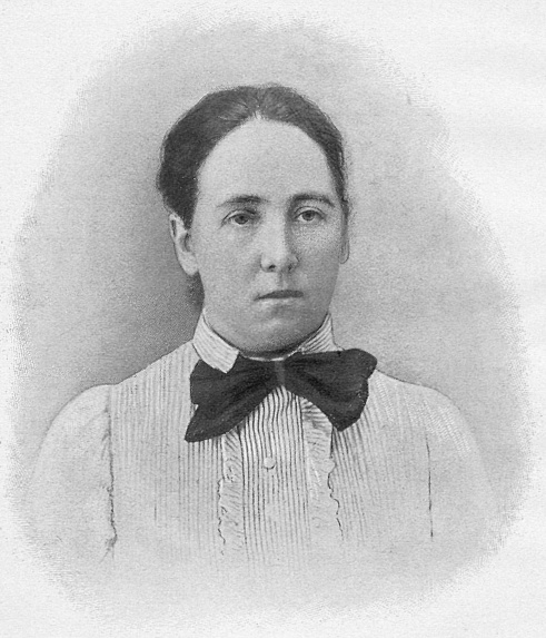 Людмила Александровна Волкенштейн (урождённая Александрова) (18 сентября 1857, Киев —10 января 1906 Владивосток) — русская революционерка, член партии "Народная воля".